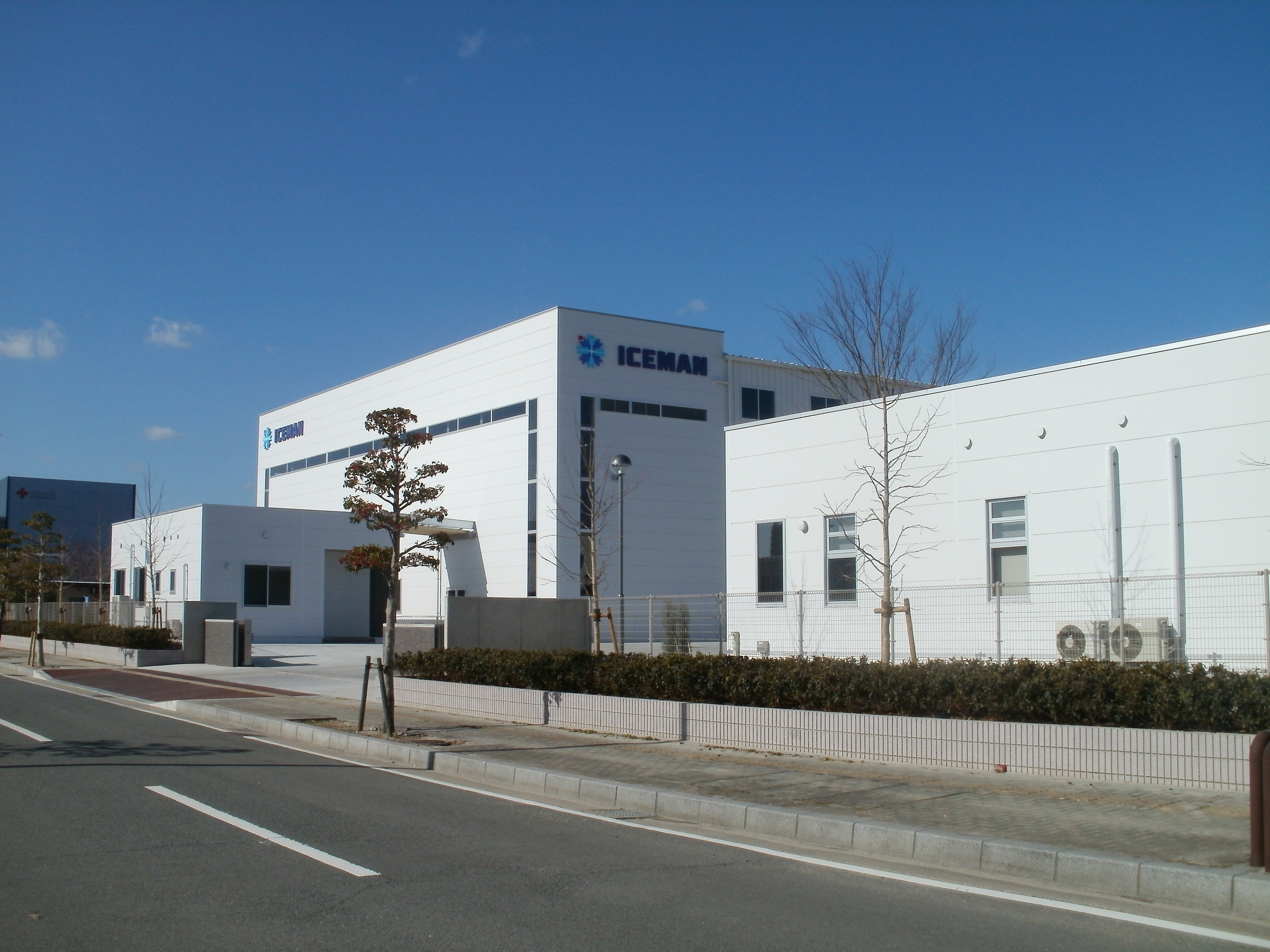 アイスマン本社